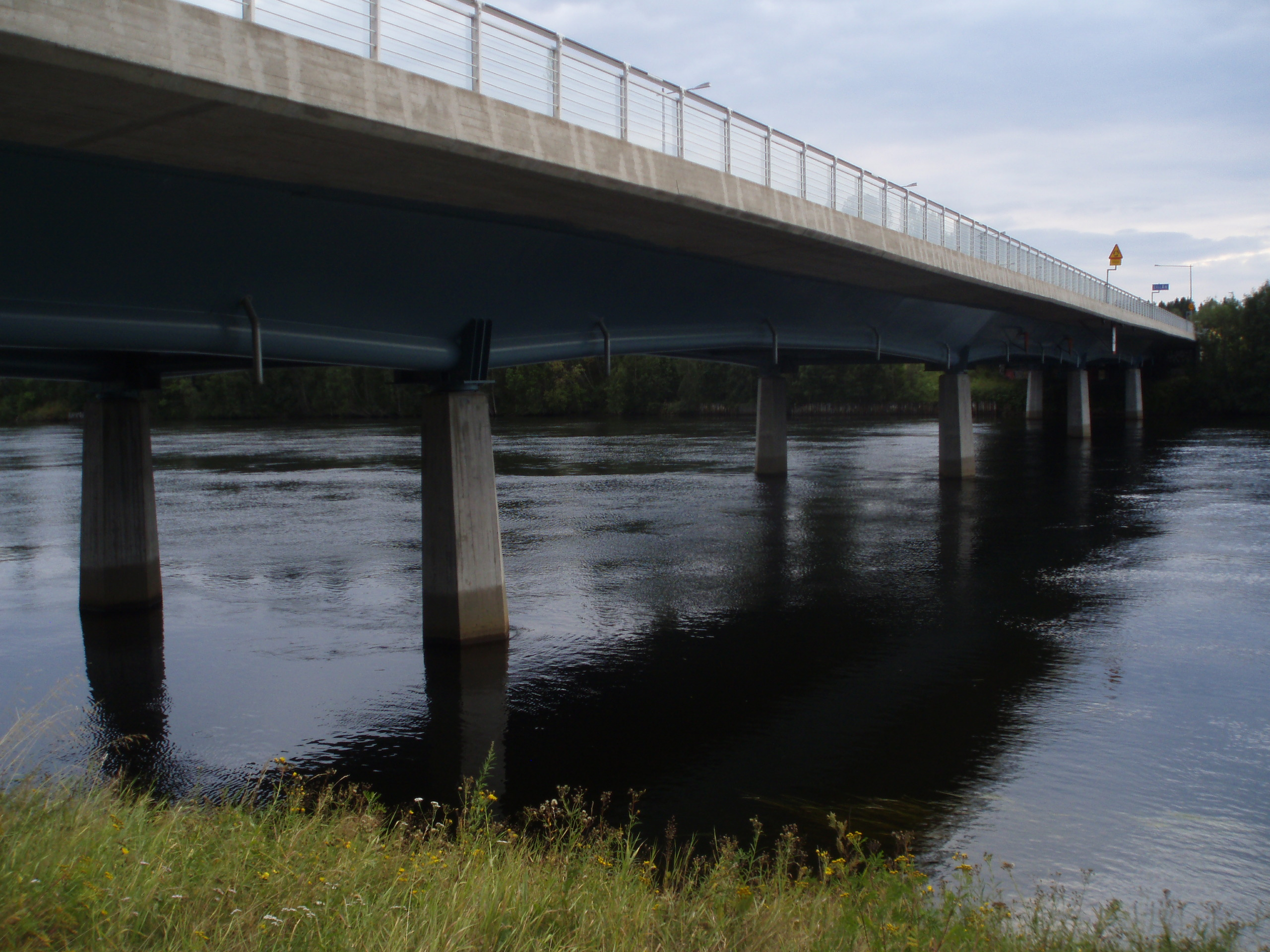 Kolbäcksbron i Umeå, sedd från Ön. Delen av bron som går över Lillån.